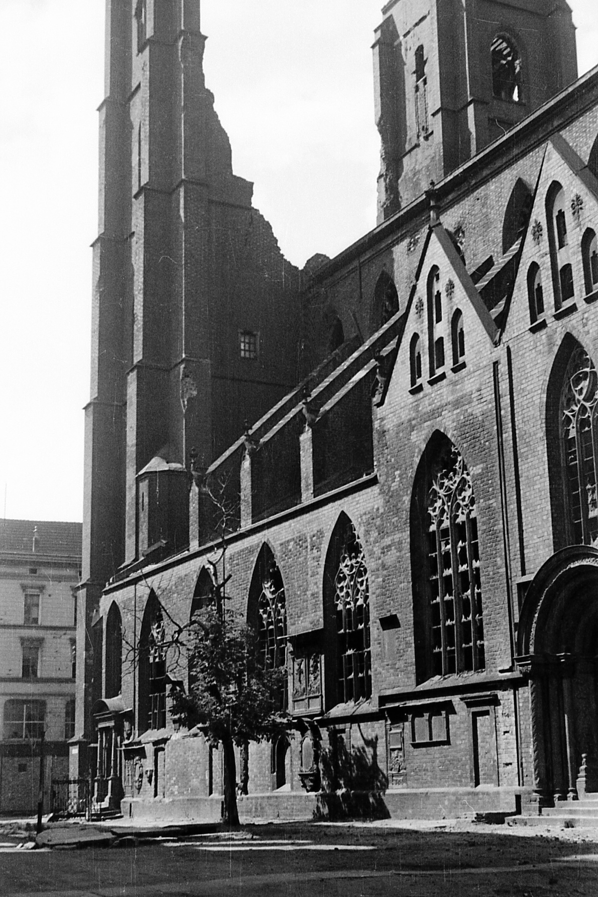 kościół Marii Magdaleny we Wrocławiu, uszkodzony po zniszczeniach II wojny światowej, przed odbudową